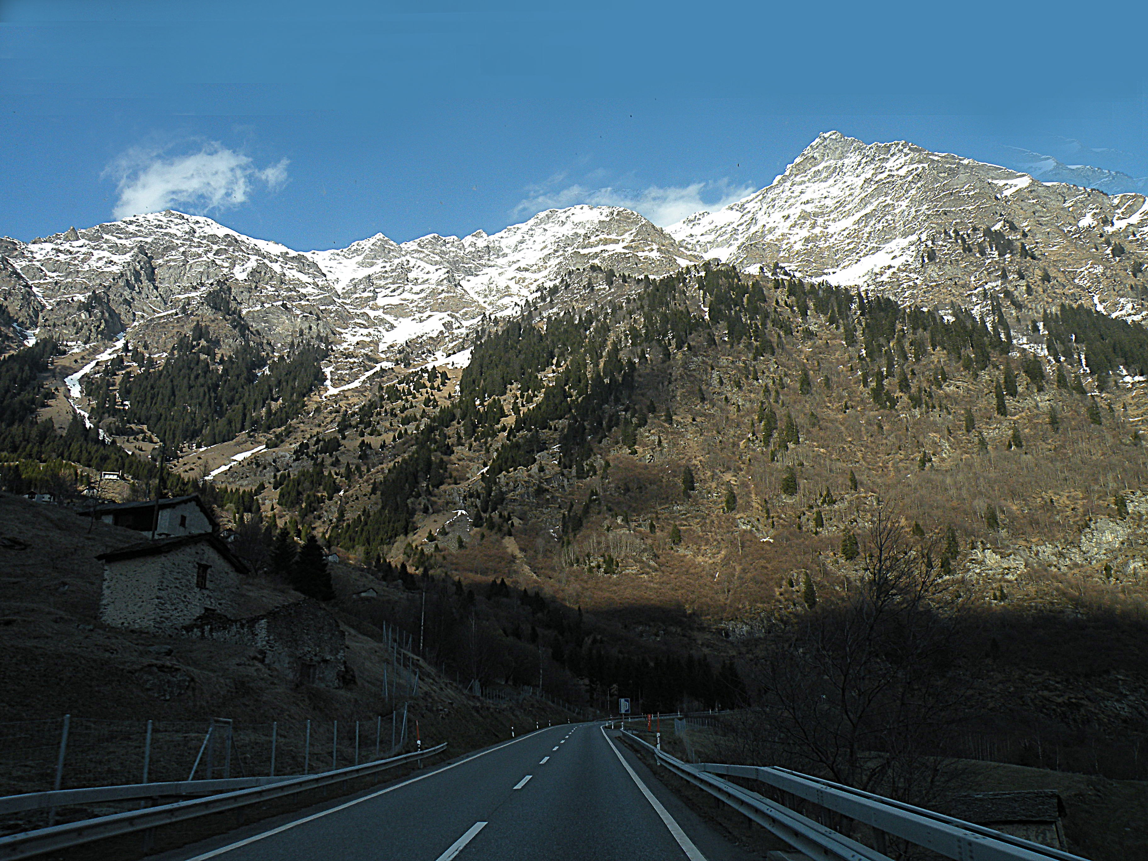 Альпы перед перевалом Сан-Бернардино